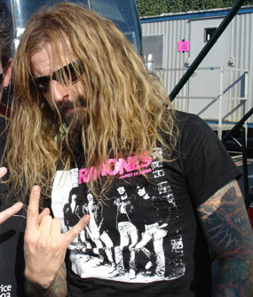 Rob Zombie from Ozzfest.